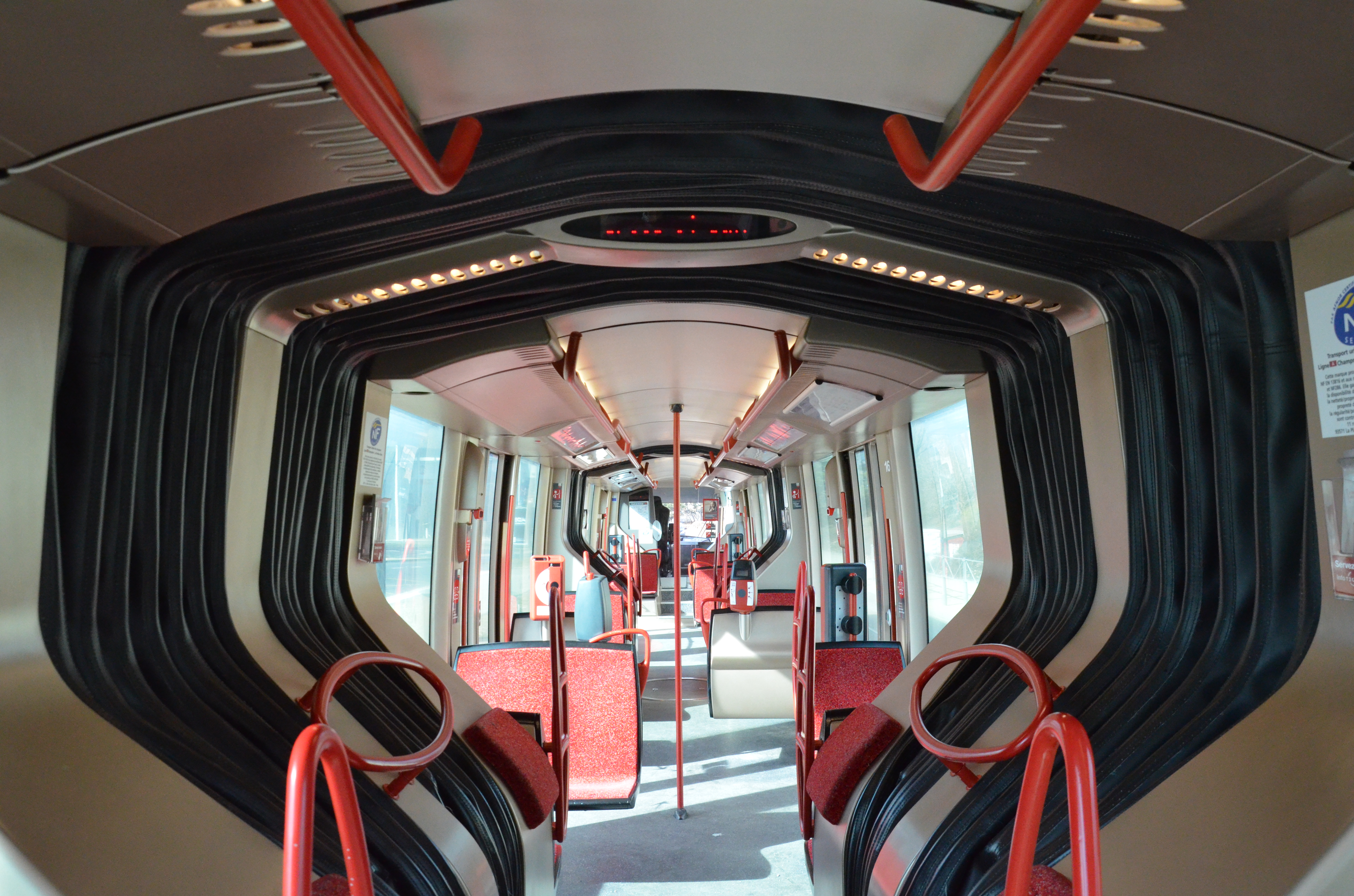 Intérieur d'un Translohr STE4 du réseau T2C de Clermont-Ferrand.